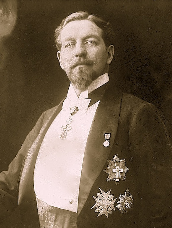 Philippe VIII, duc d'Orléans